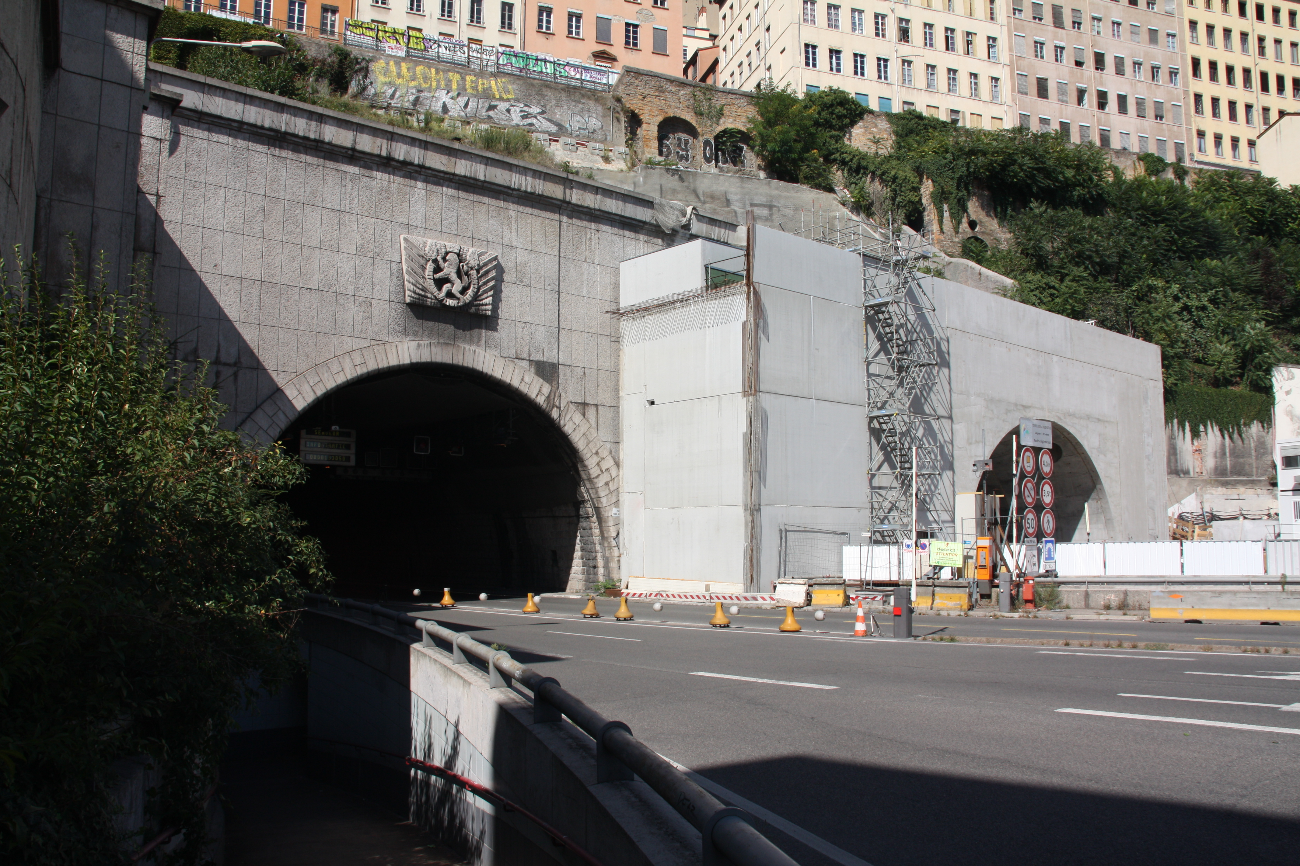 Entrée Est du Tunnel de la Croix-Rousse en chantier pour la création d'un second tube.